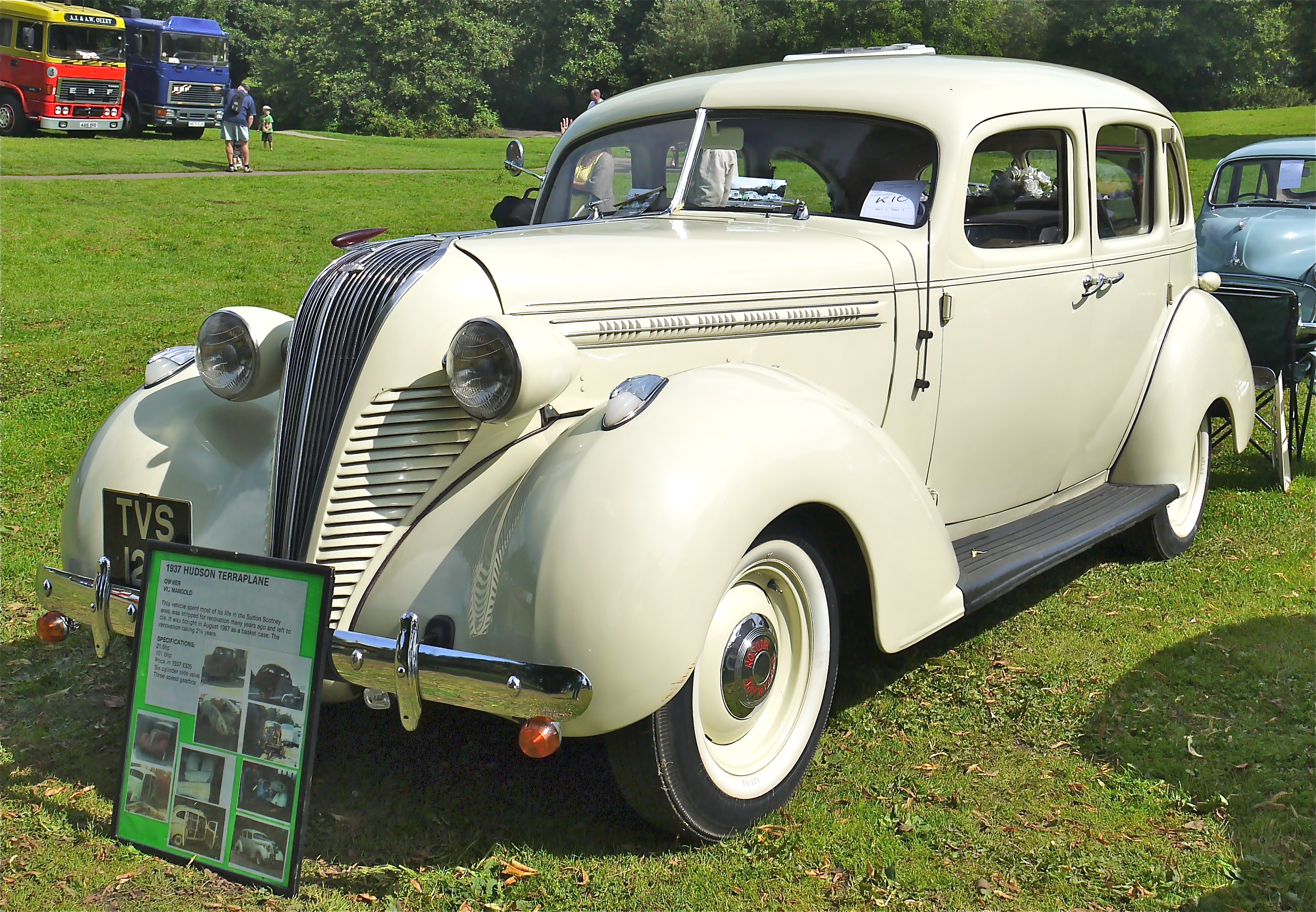 Panasonic G1 14-45 Lens